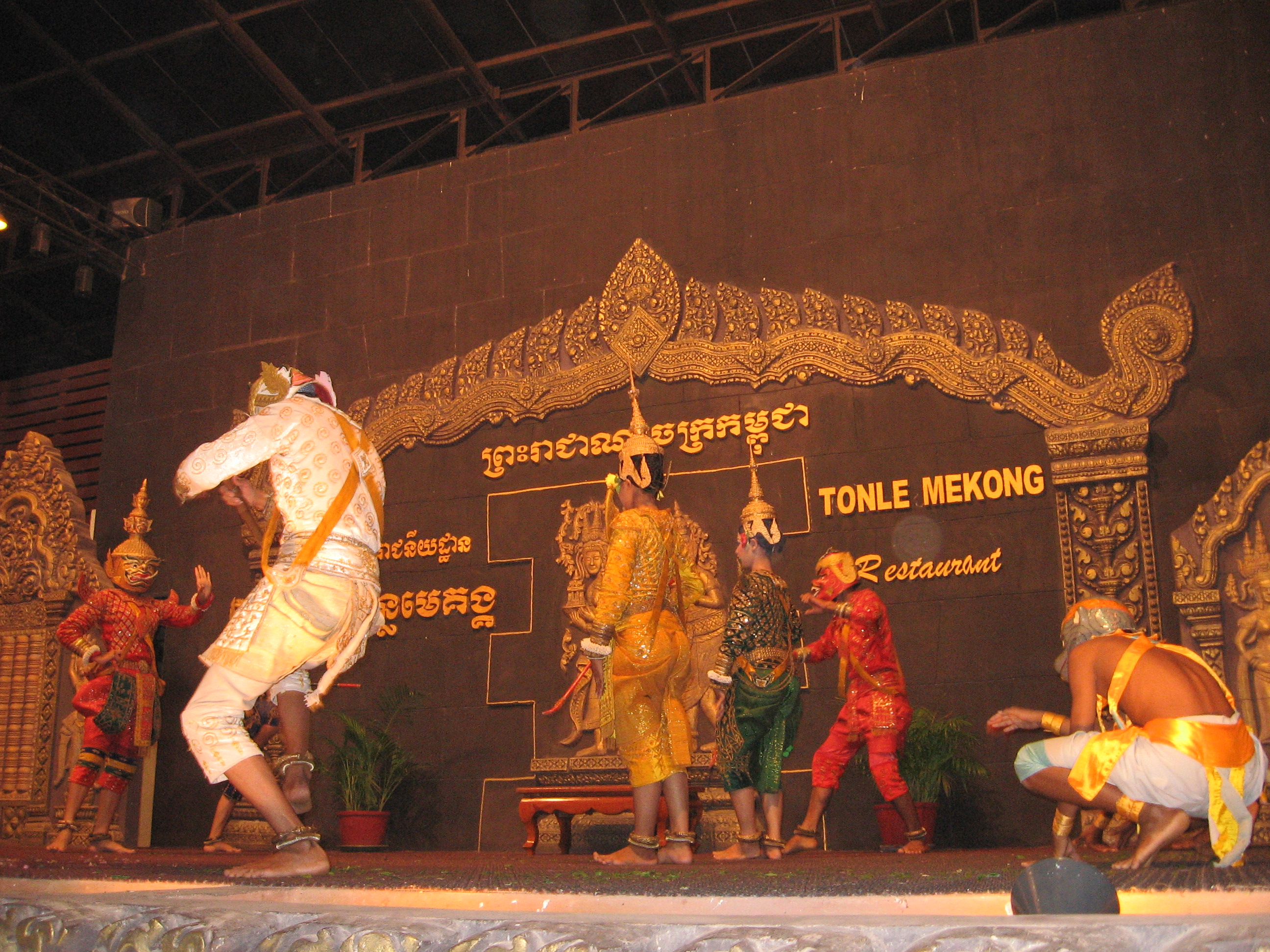 Một vở diễn Riêm Kê diễn tại Siêm Riệp- Phan Minh Châu chụp tại Siêm Riệp.